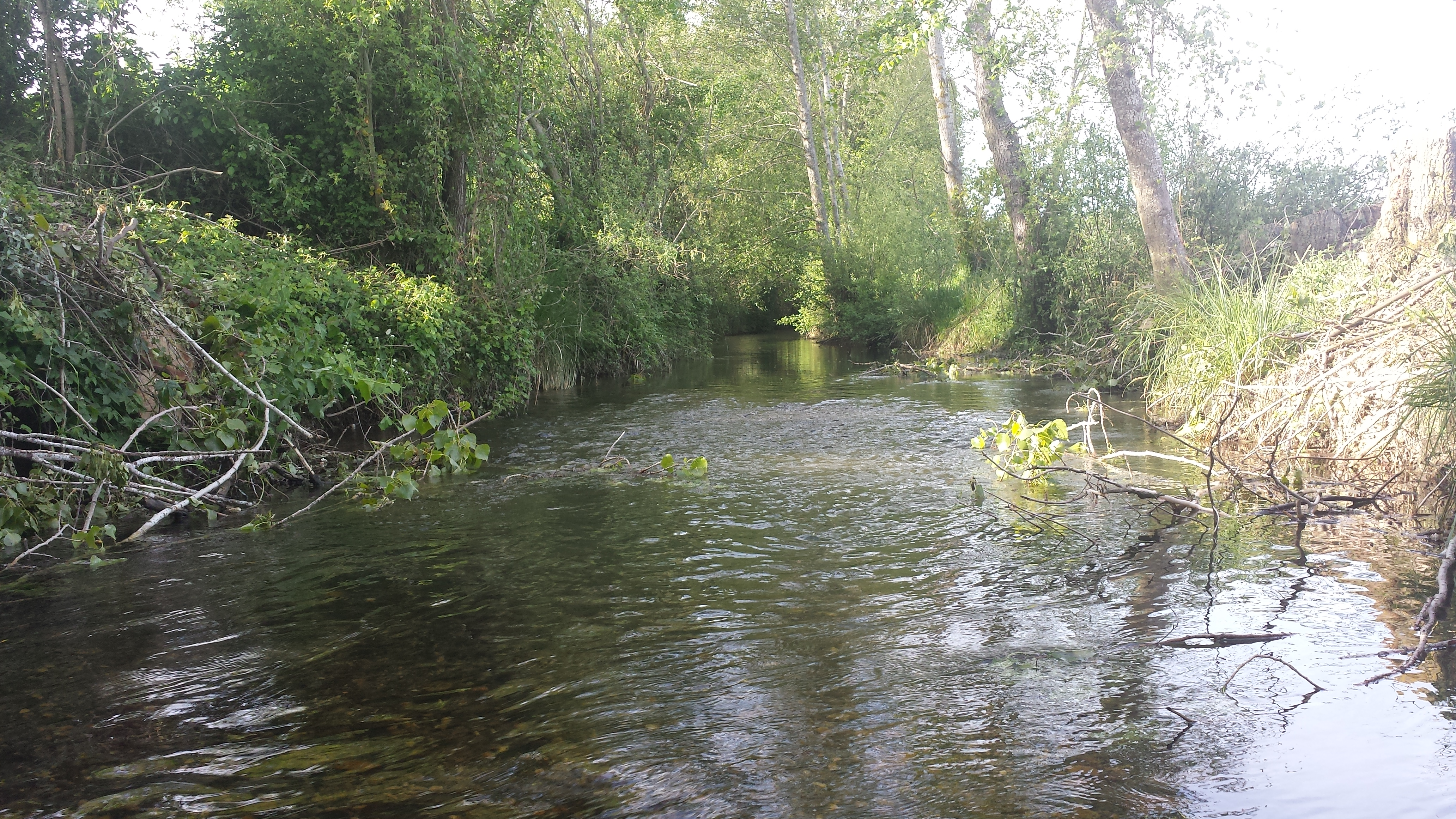 Arroyo Nuevo a su paso por el término municipal de Santervás de la Vega.